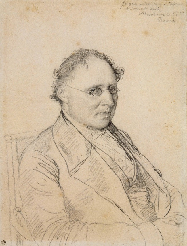 David DRACH, baptisé Paul-Louis-Bernard DRACH, dit "le Chevalier Drach" (1791-1865), portait par Jean-Auguste-Dominique INGRES (1780-1867)